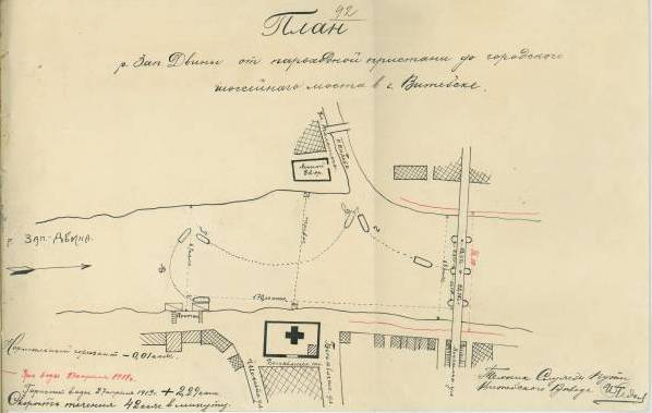 Схема крушэння парахода «Надзея»